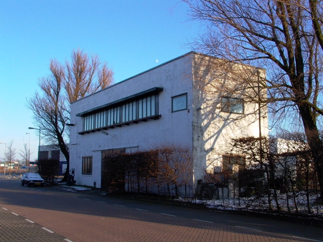 Poortgebouw van de afgebroken woonschool Asterdorp in Amsterdam-Noord, tegenwoordig eigendom van woningcorporatie Ymere